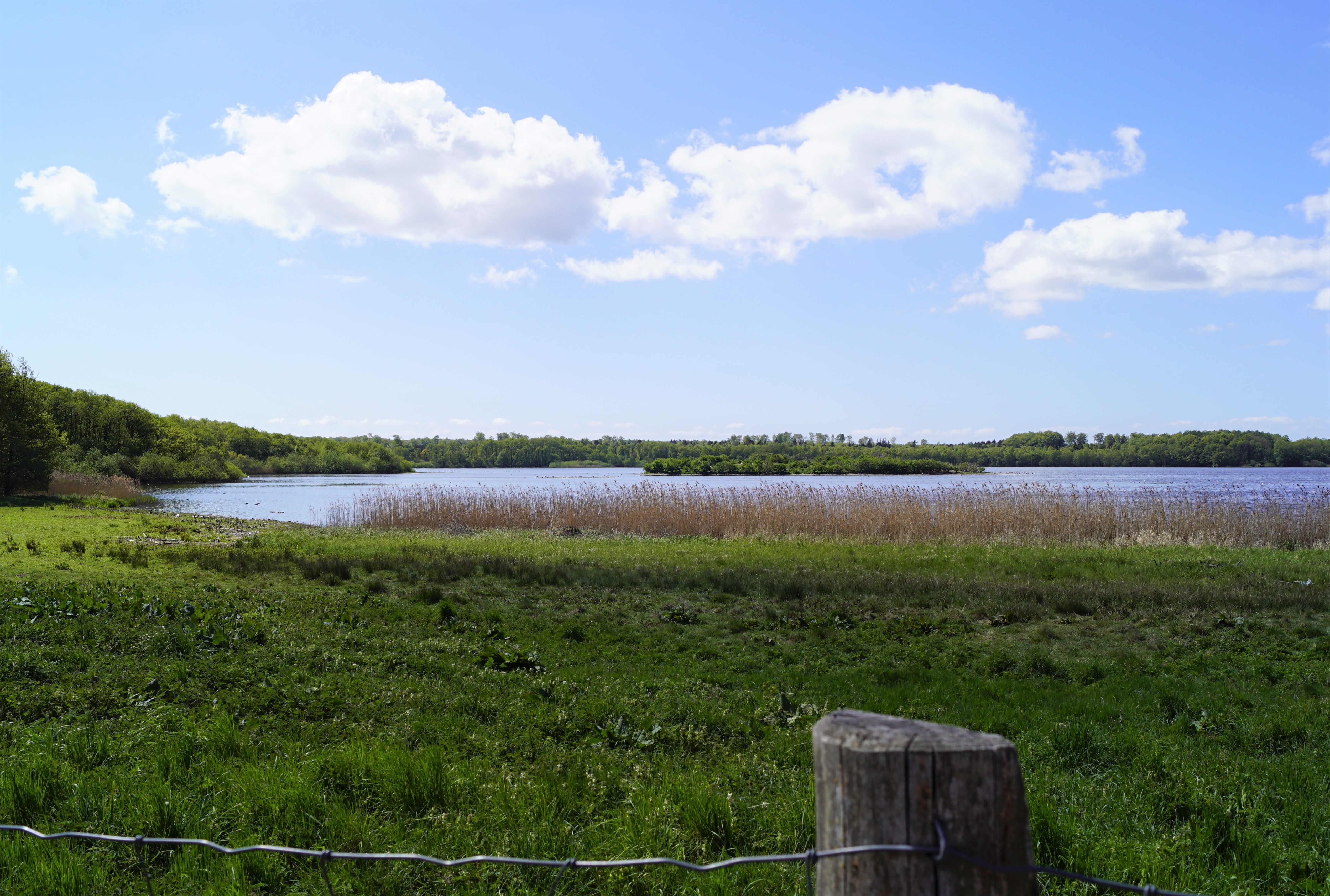 Brændegård Sø på Fyn set mod sydvest